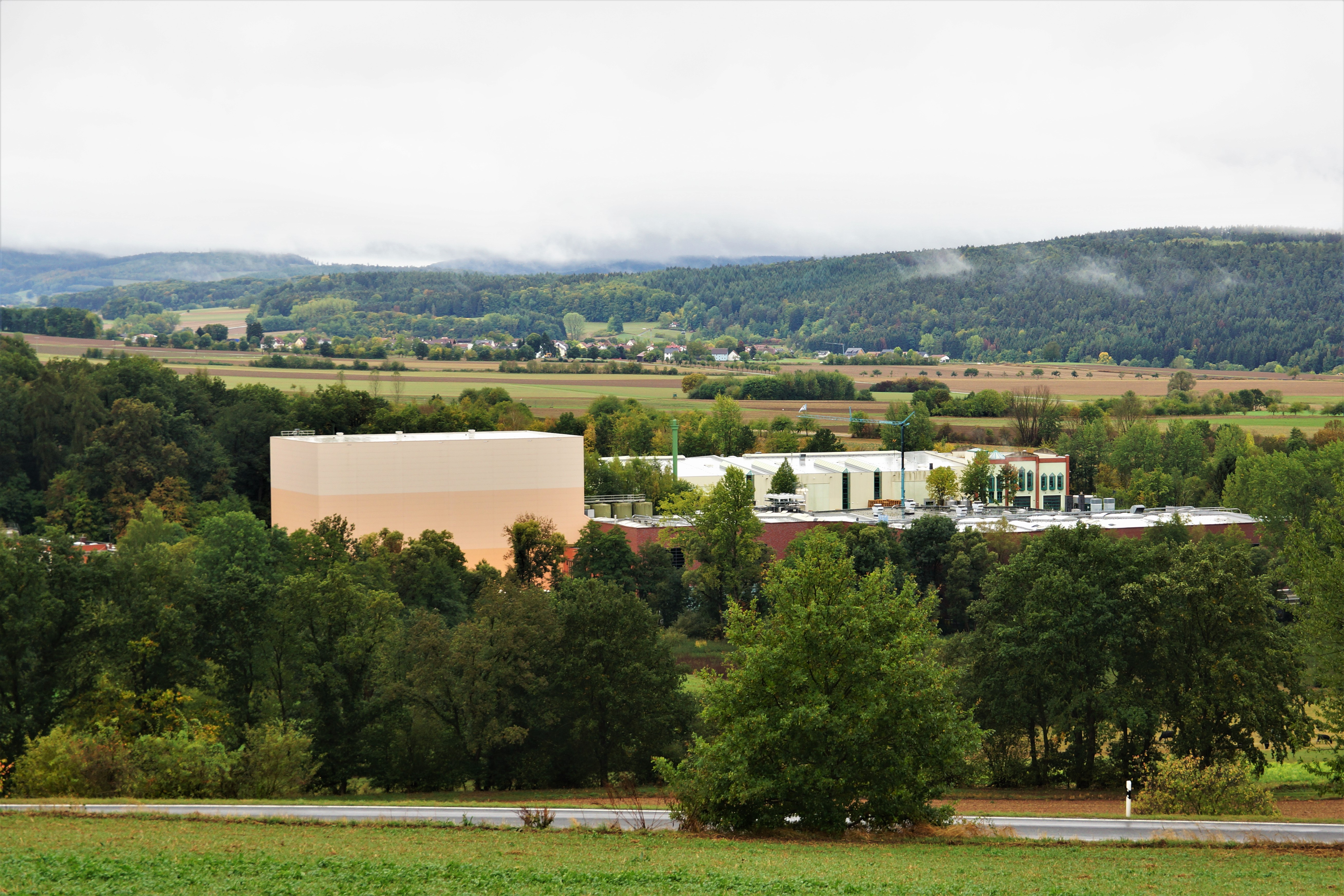 Betriebsgelande der Firma Rhönsprudel im Lüttertal in Ebersburg Im Hintergrund der Ortsteil Ried